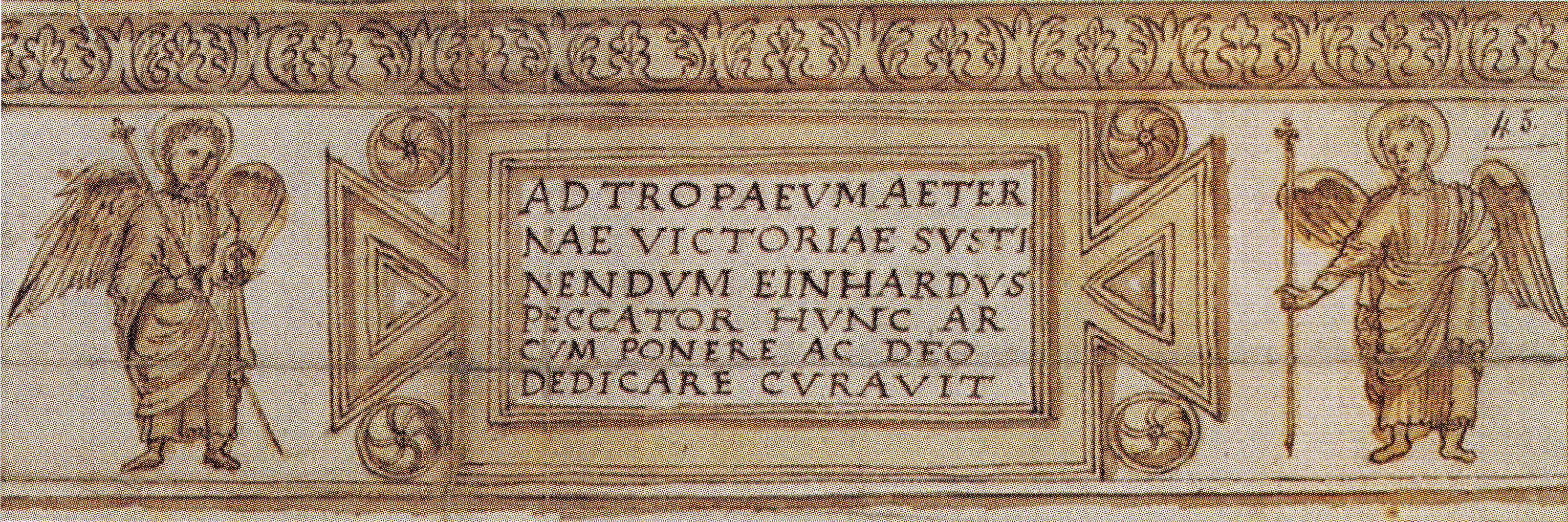 Detail van een 17e-eeuwse tekening van de Arcus Einhardi (Einhardsboog) in de Bibliothèque nationale de France in Parijs, collectie manuscrits occidentaux, français, nr. 10440, folio 45. De Einhardsboog is een verloren gegaan zilveren voetstuk van een reliekenkruis in de vorm van een Romeinse triomfboog. Het kostbare voorwerp ontstond begin 9e eeuw in de Akense werkplaatsen en werd omstreeks 825 door Einhard (volgens het opschrift) geschonken aan de Sint-Servaaskerk in Maastricht. Daar bleef het bijna 1000 jaar bewaard, totdat het in de Franse tijd verloren ging, waarschijnlijk omgesmolten. Hier een detail van de achterzijde met de tabula ansate met daarin de wijdingstekst van Einhard, geflankeerd door twee engelen.